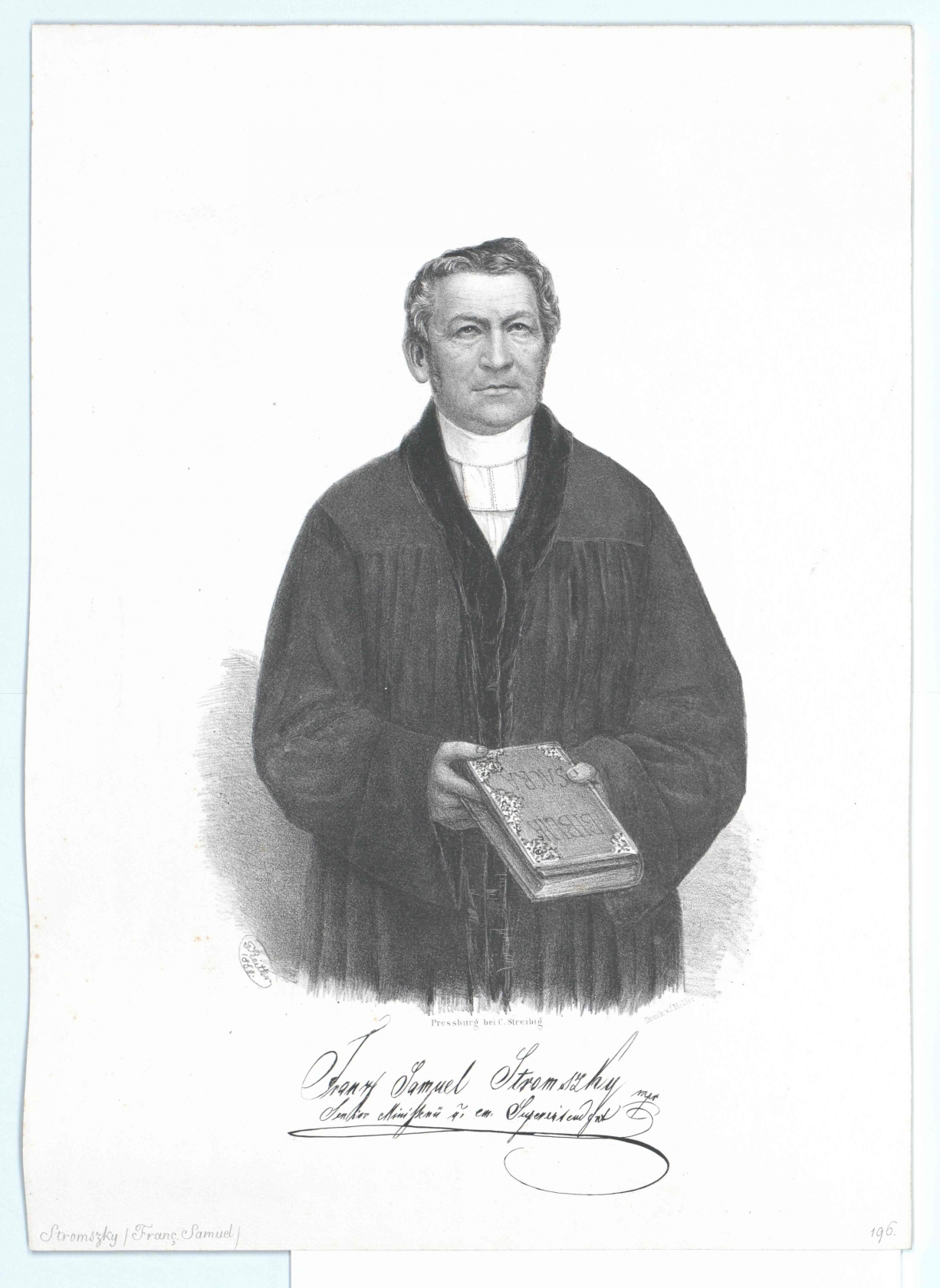 Evangelischer Pfarrer und Superintendent der Ungarländischen Evangelischen Kirche A. B. für den Distrikt Cisdanubien.